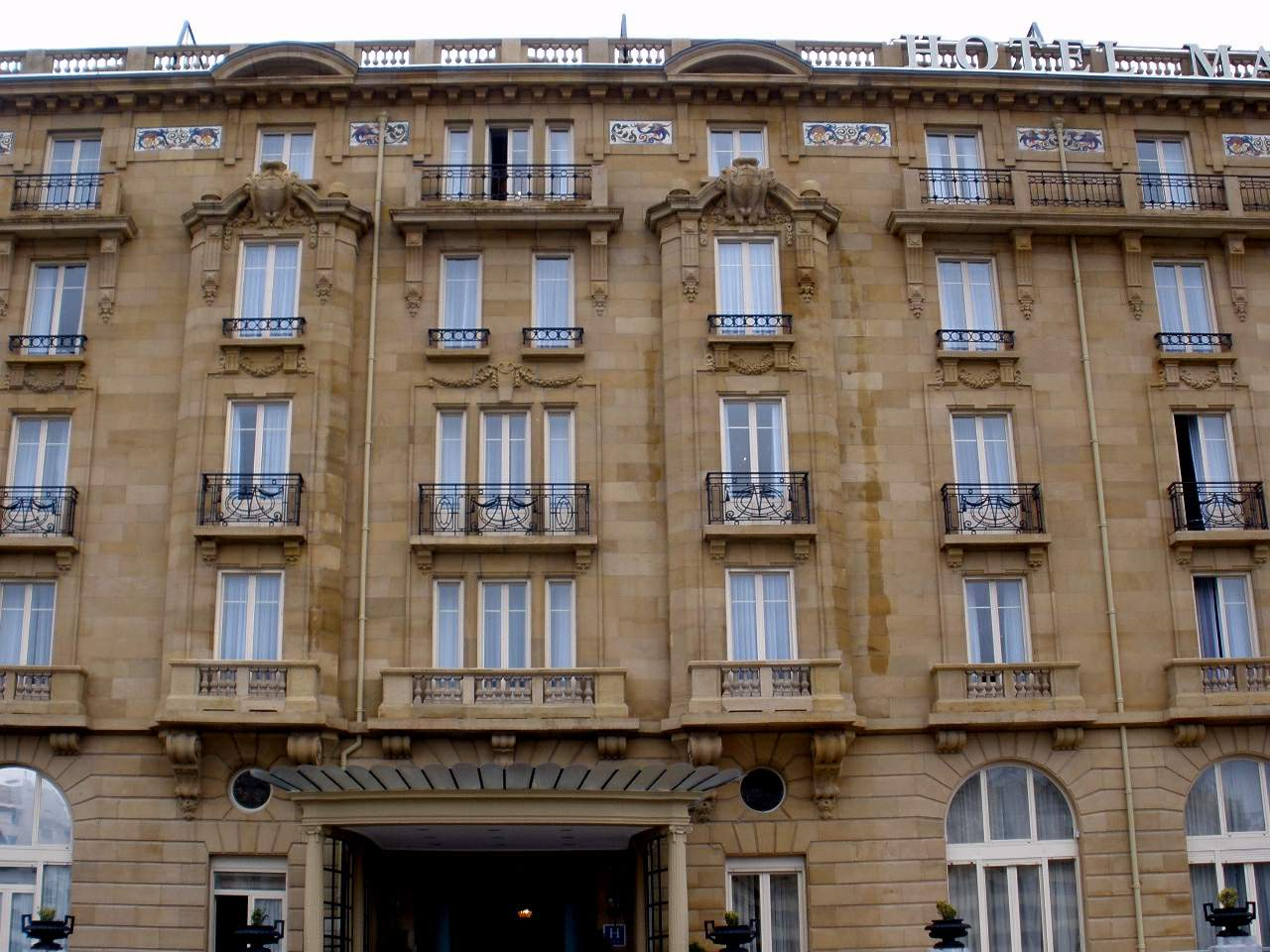 San Sebastian - Hotel Maria Cristina